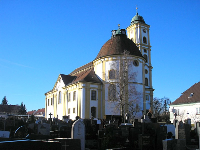 Wallfahrtskirche Herrgottsruh (Friedberg, Landkreis Aichach Friedberg, Bayerisch-Schwaben). Ansicht von Südosten. Eigene Aufnahme, Jan. 2007 / Pilgrimage church "Herrgottsruh" (Friedberg, Bavaria, Germany). View from the south-east. Own photo, Jan. 2007